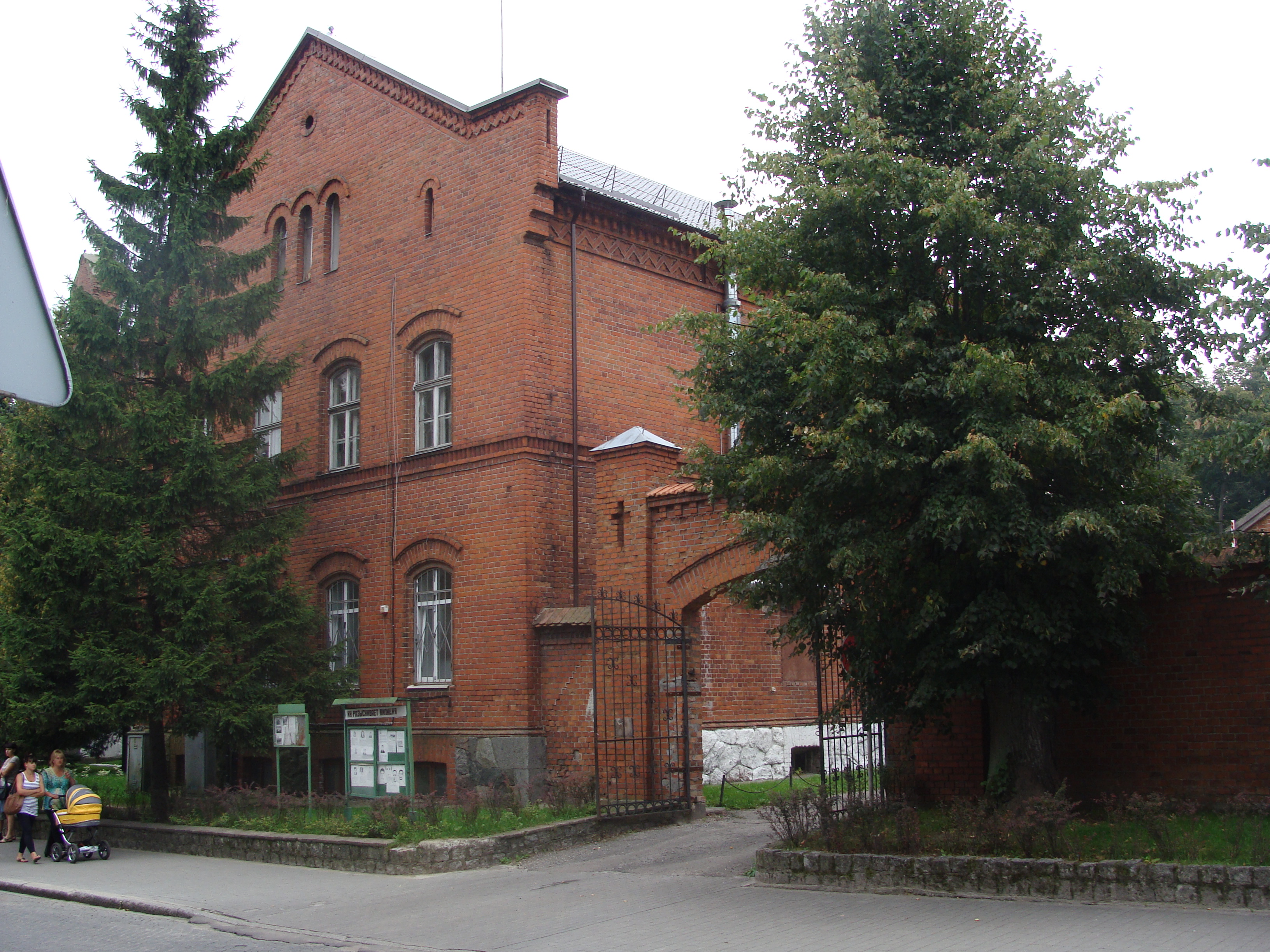 Здание Королевской учительской семинарии (Прейсиш-Эйлау, Германия, 1861). С 1924 года в этом здании располагалась гимназия имени генерала Шарнхорста, известного прусского реформатора и участника сражения при Пройсиш_Эйлау 1807 года. В настоящее время - здание городской и районной администрации (Багратионовск, Калининградская область, Россия). Фотография сделана 19.08.2011.